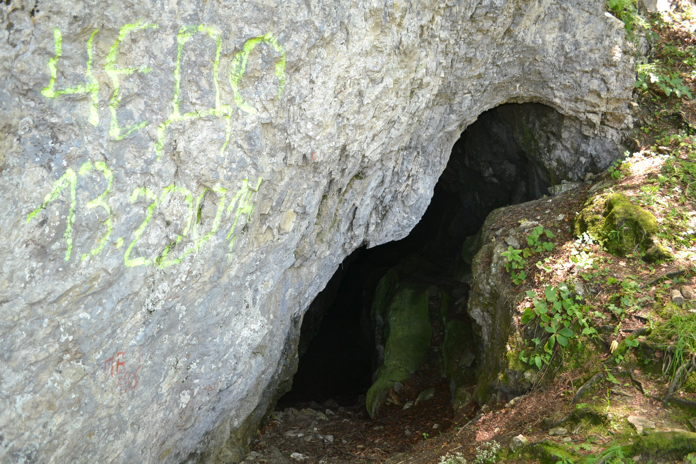 Улаз у пећину